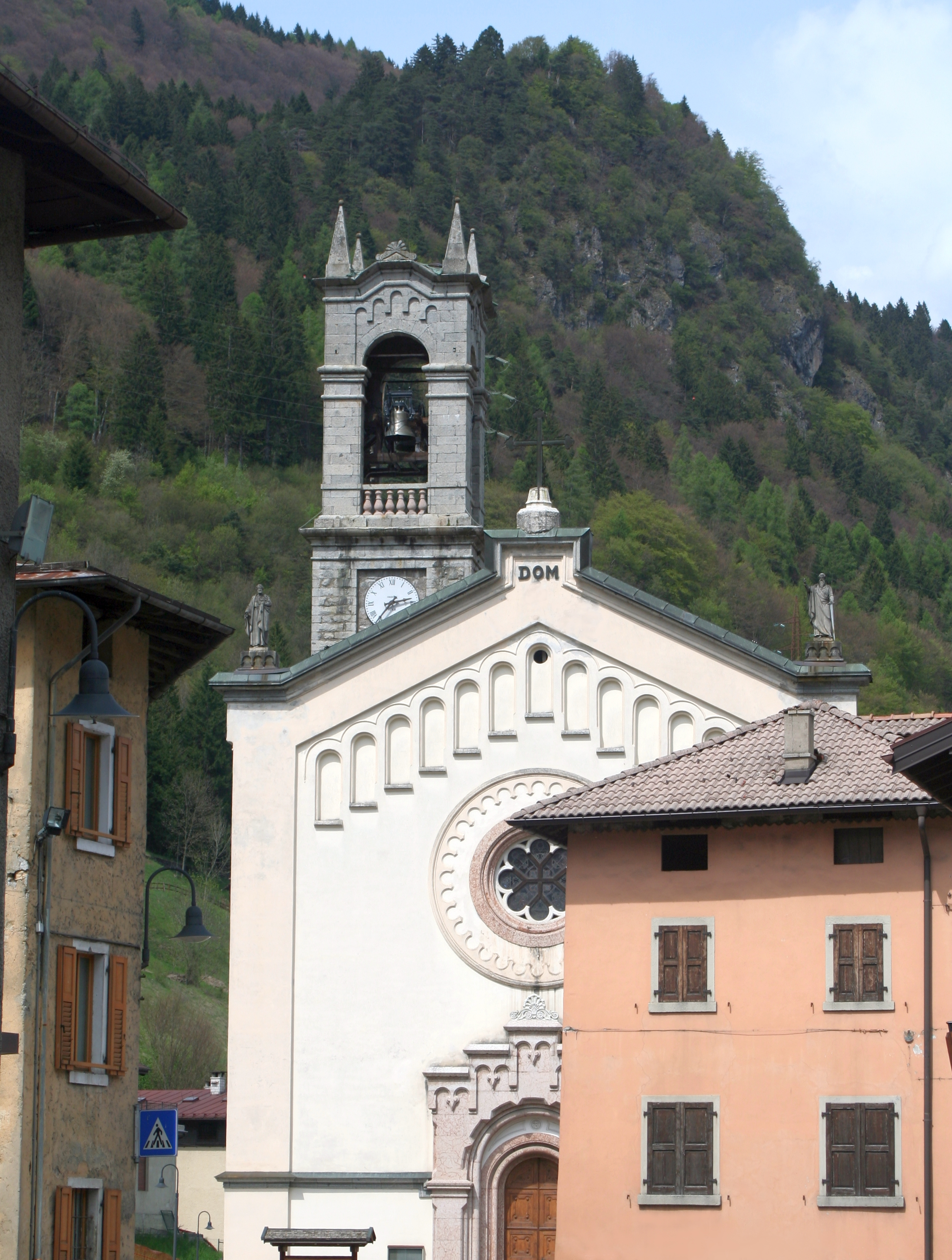 Sant'Andrea in Breguzzo TN